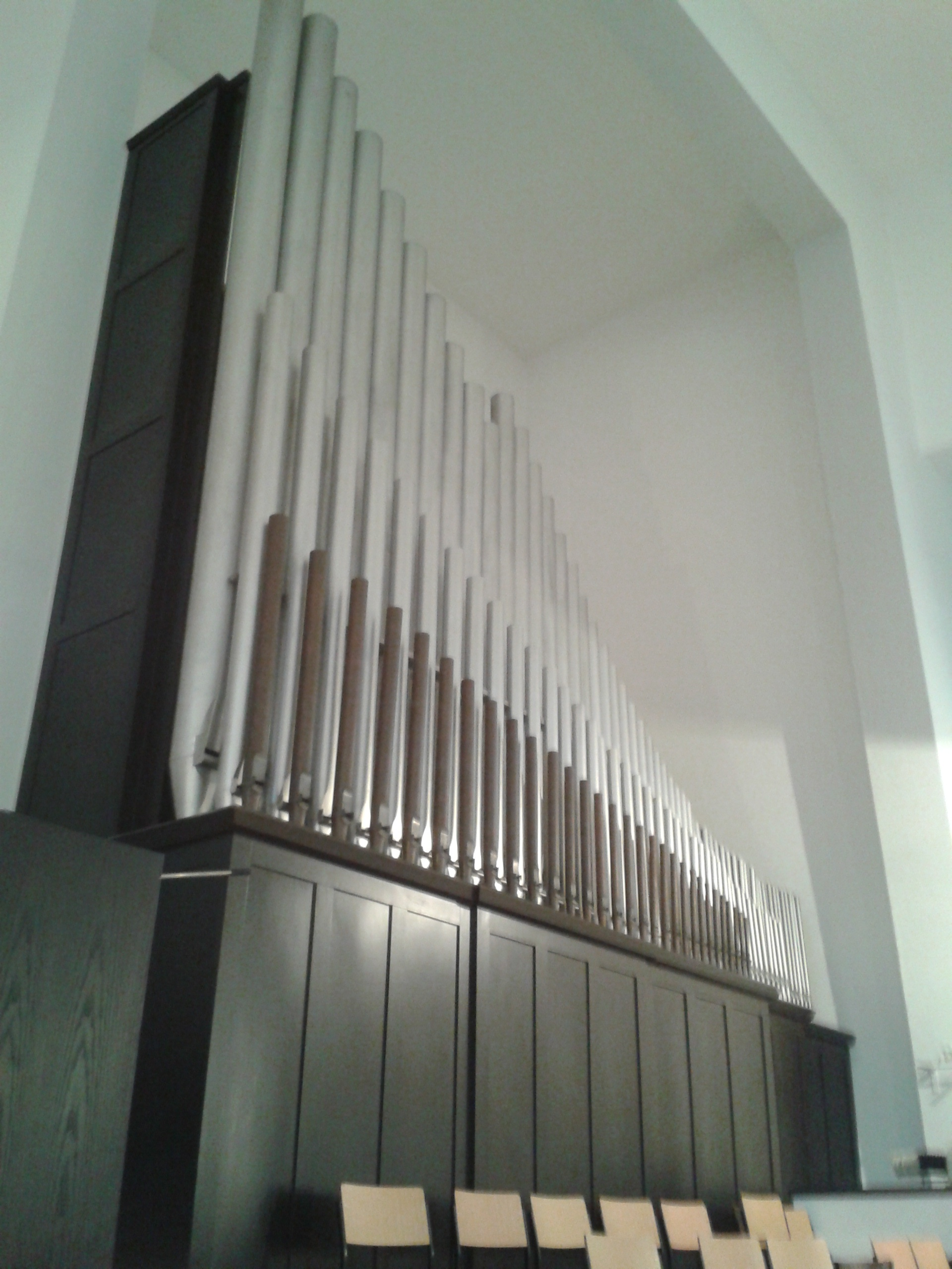 Orgel der Heilig Geist Kirche in Münster